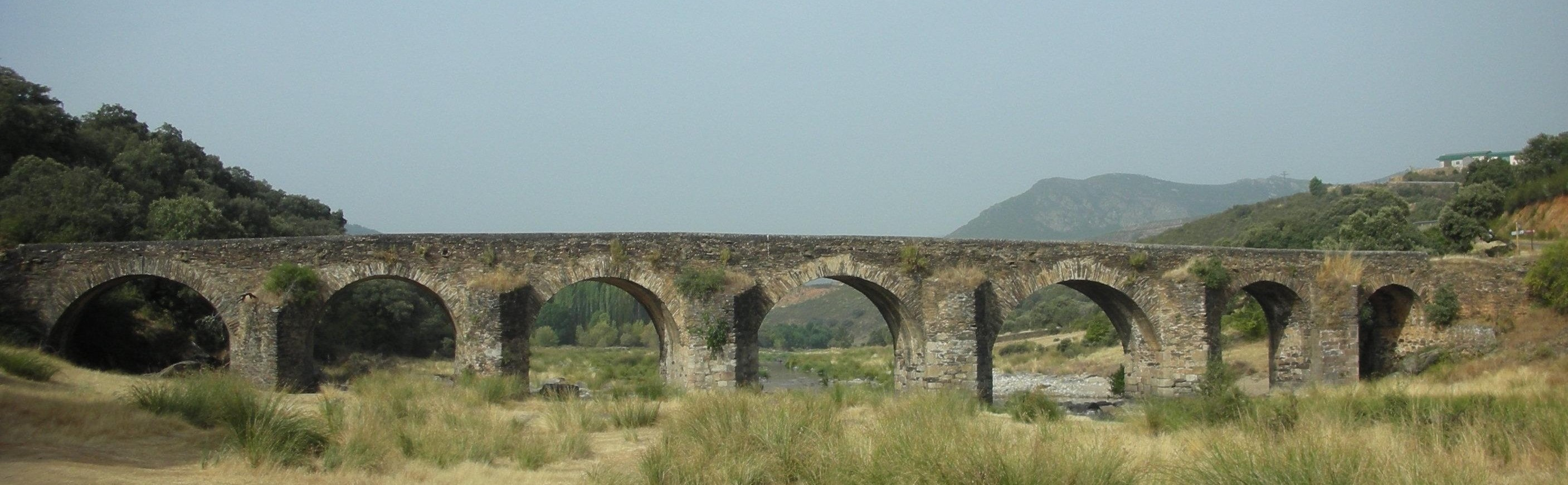 Pont romain sur la rivière Alagon sur la commune de Sotoserrano en Espagne